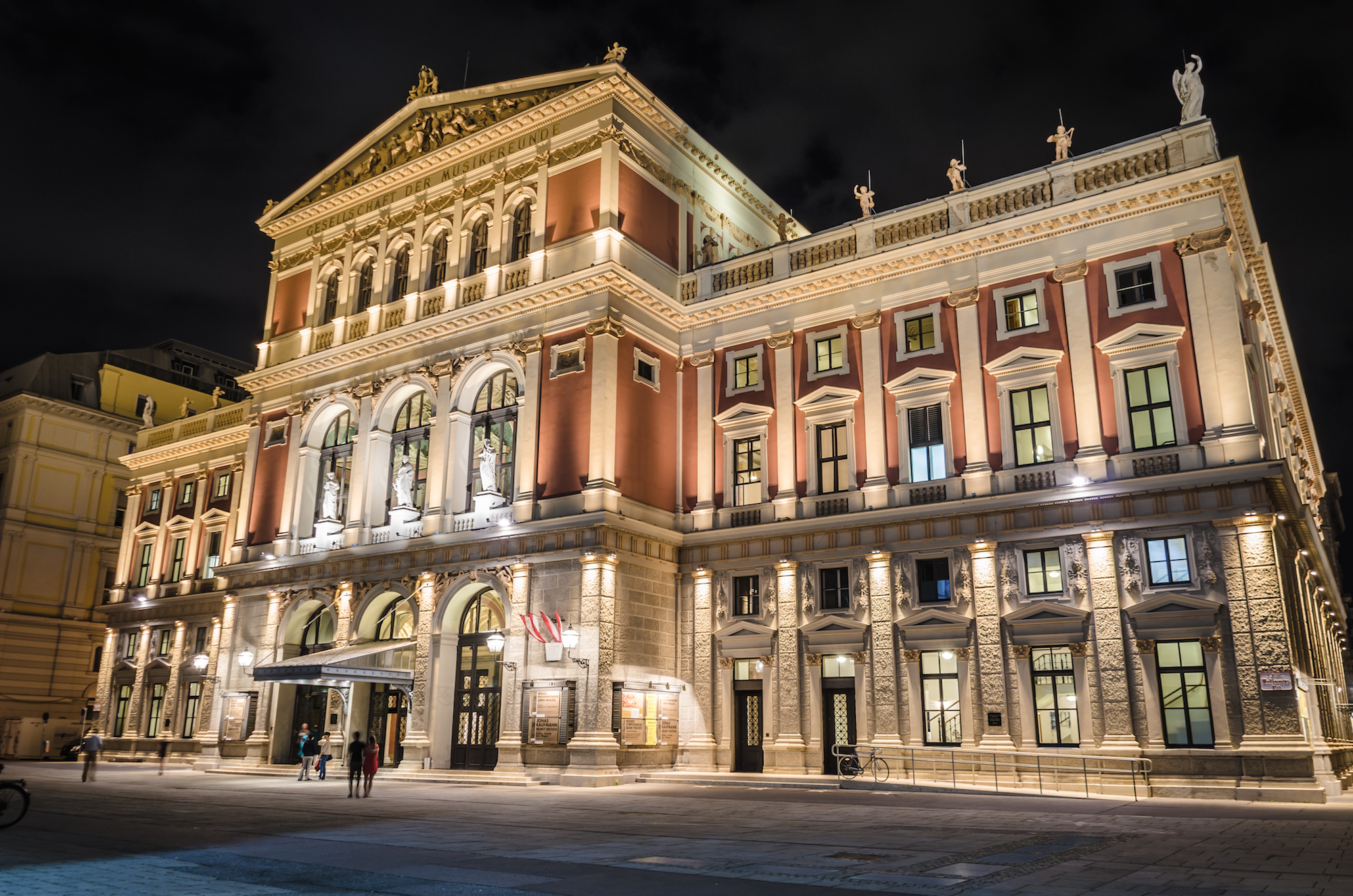 Musikverein